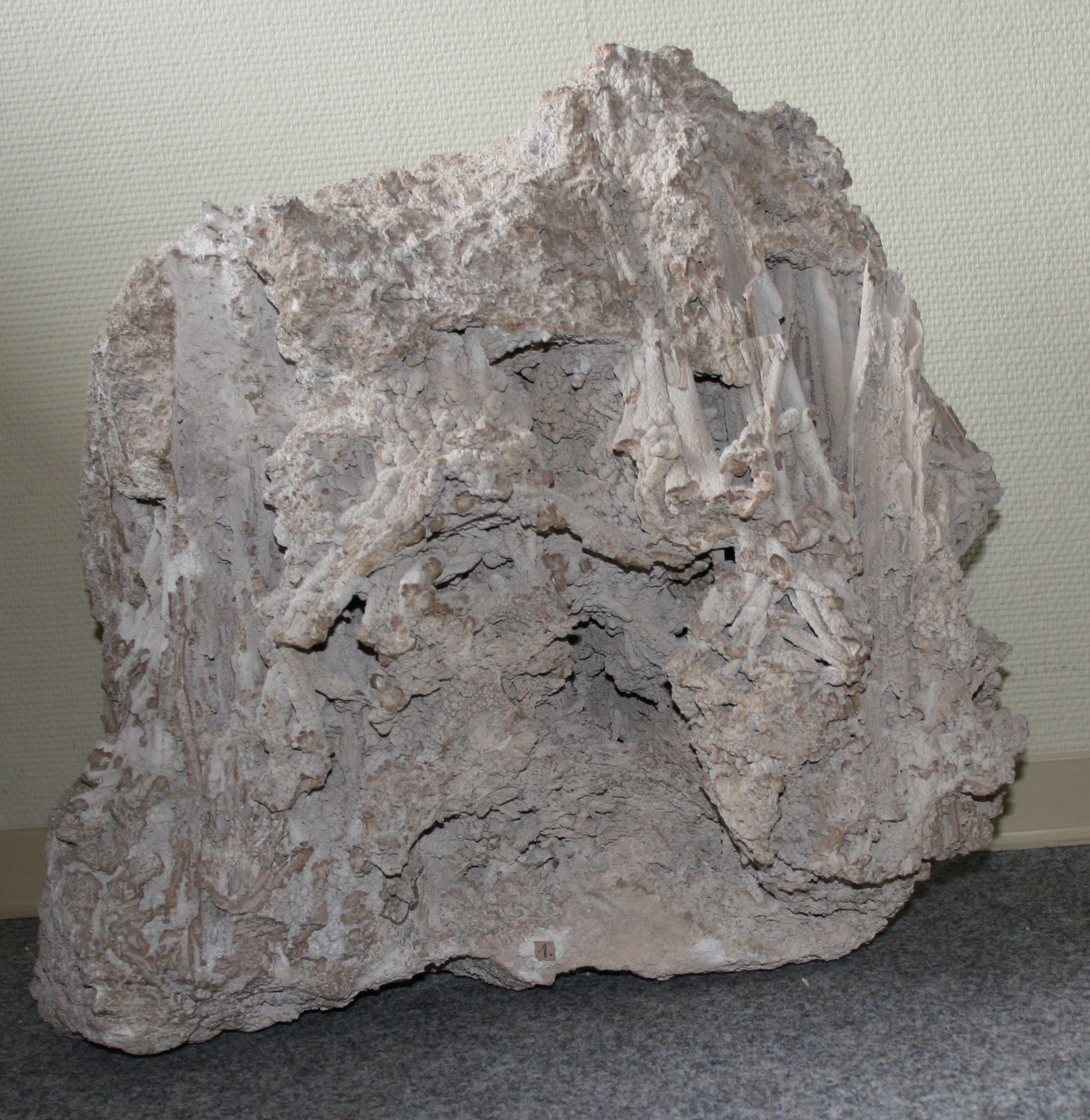 Ducksteinmuster aus Königslutter